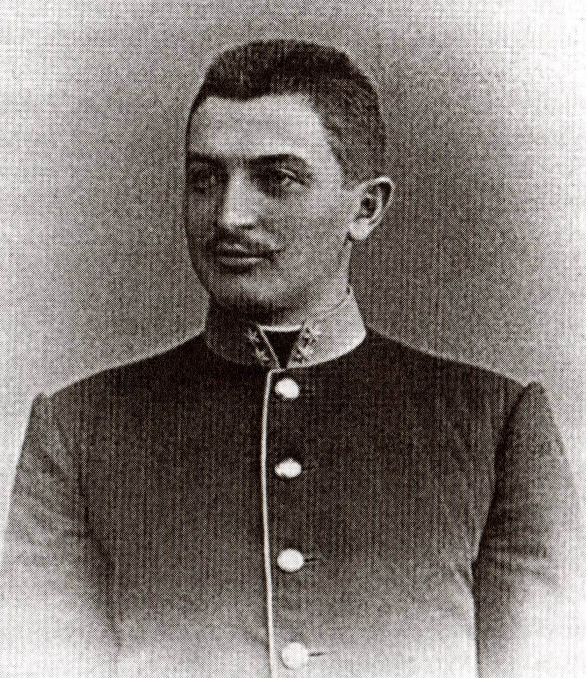 Alois Podhajský (1864 - 1946), Rakousko-uherský polní podmaršálek a později československý armádní generál.